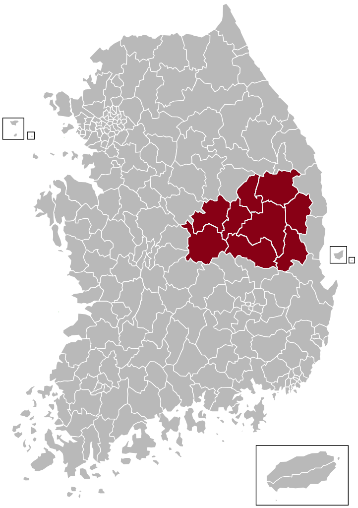 안동우편집중국 관할구역 지도